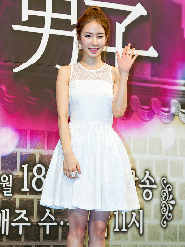 tvN 수목 드라마 인현왕후의 남자 제작 발표회에 참석한 유인나